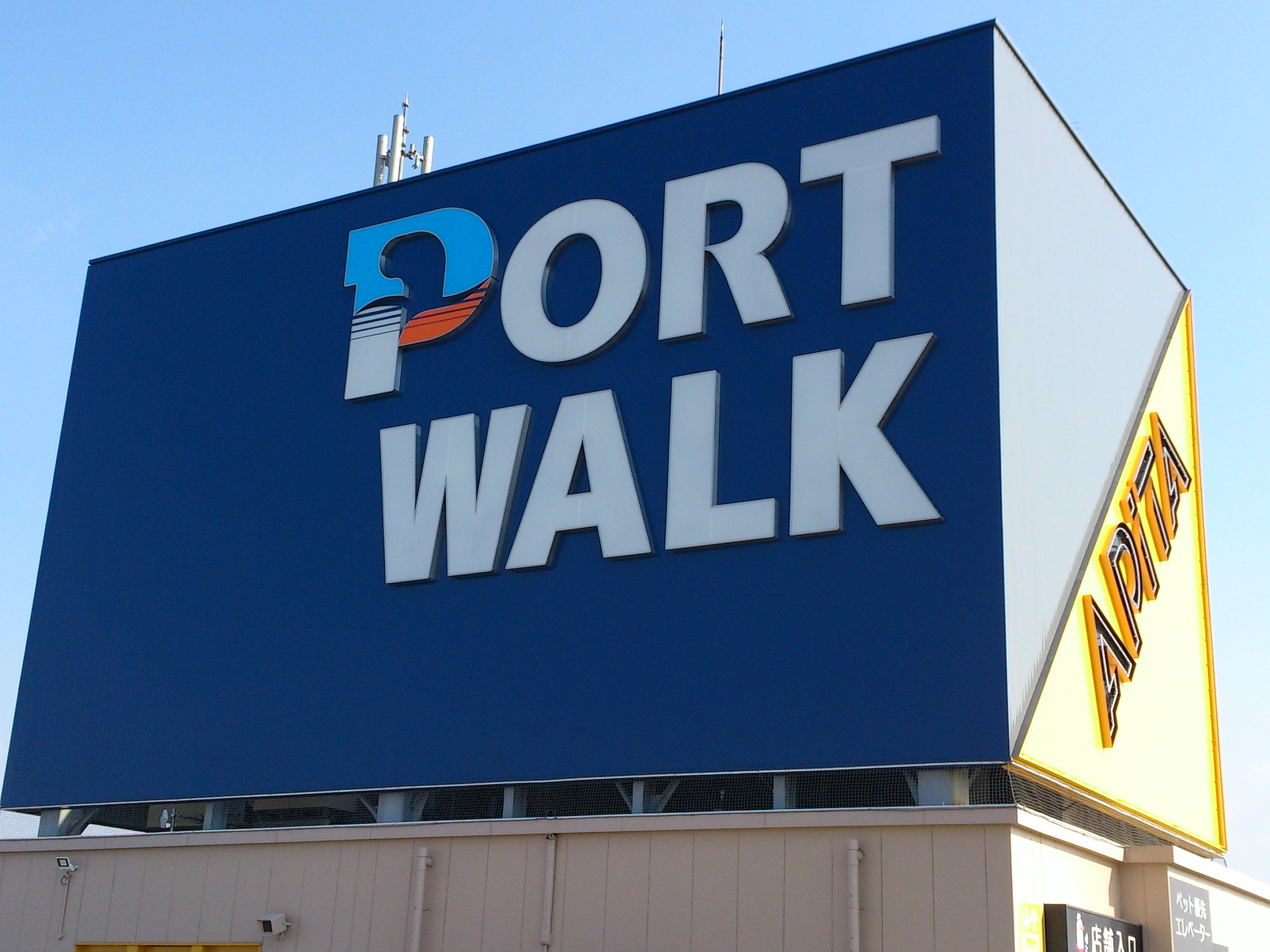 ポートウォーク港店舗看板